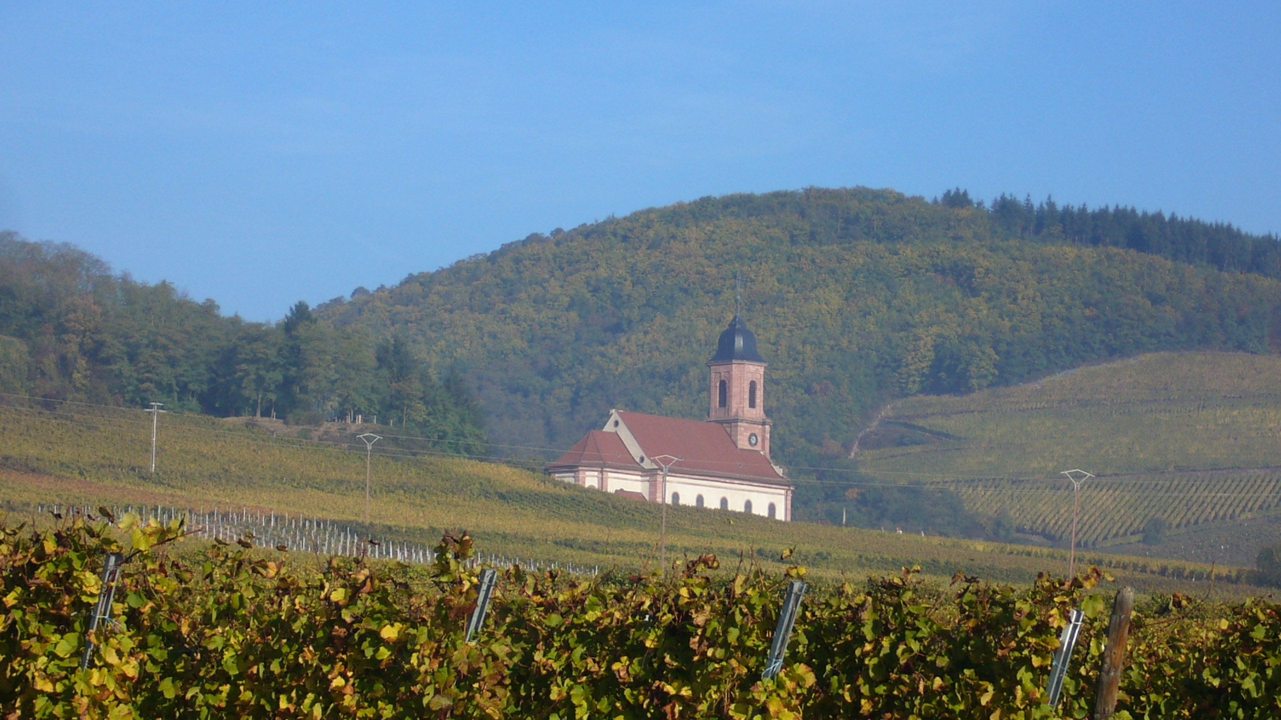 Eglise Saint-Maurice vue depuis la route entre Orschwiller et Châtenois